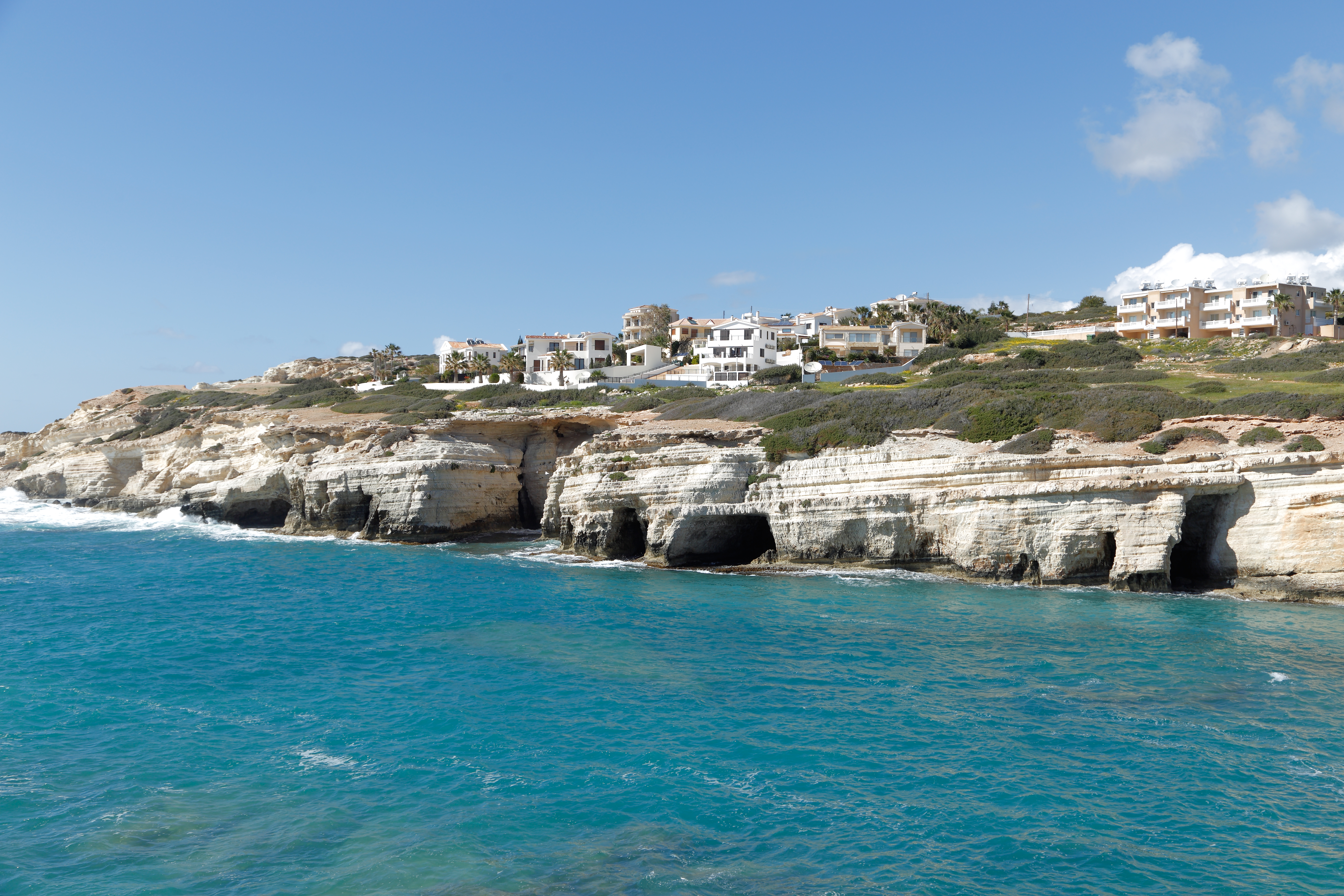 Sea Caves, Akamas Peninsula, Cyprus